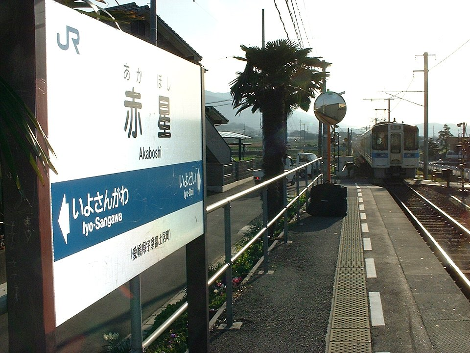 予讃線赤星駅